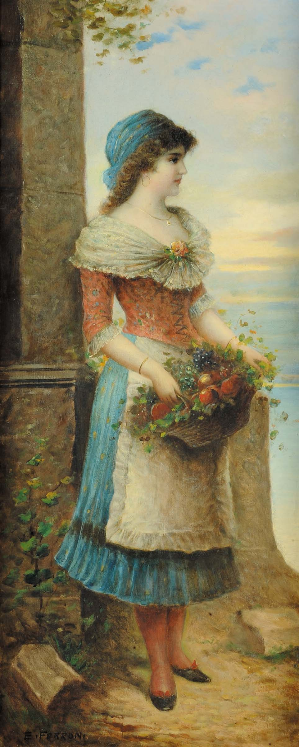 Ritratto di fioraia